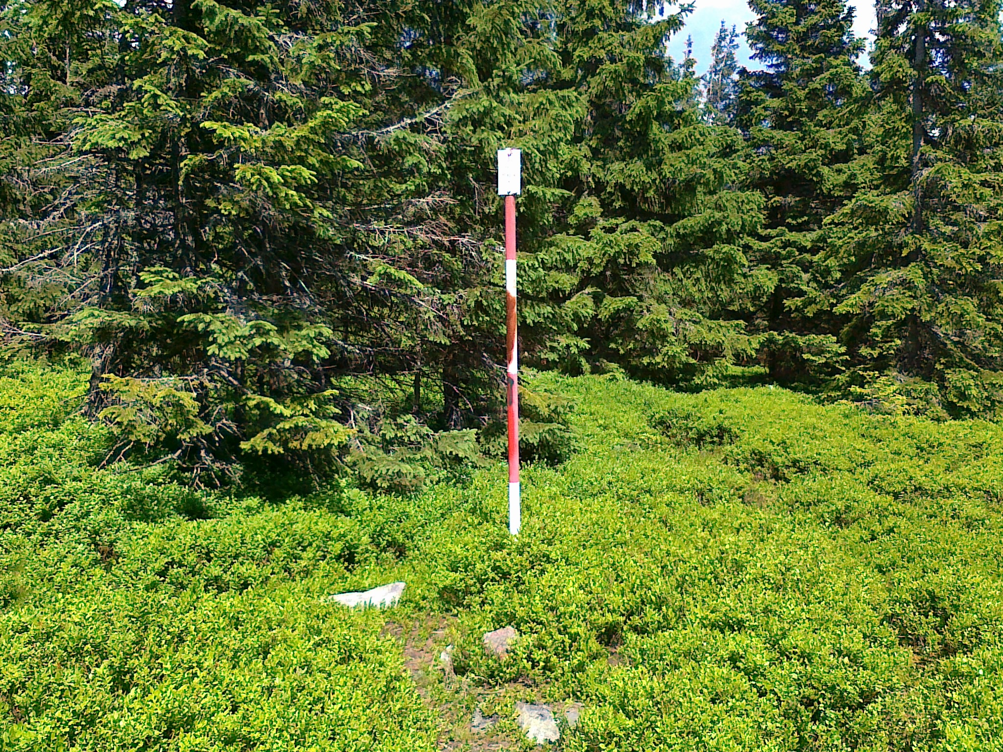 Punkt geodezyjny na szczycie góry Temná - 1263 m n.p.m.